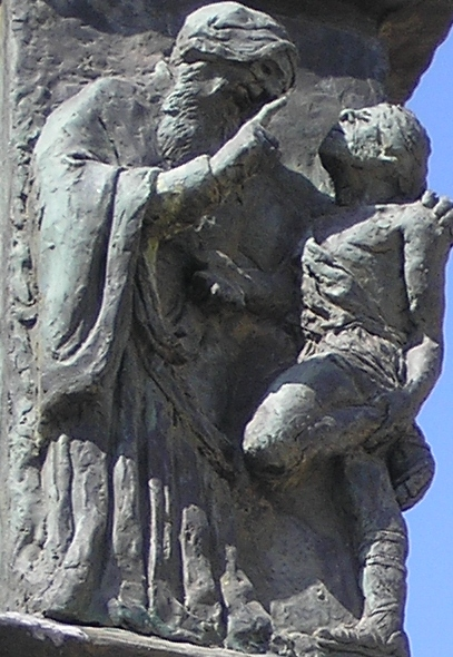 The Knesset Menorah, Jerusalem (detail - Hillel the Elder)